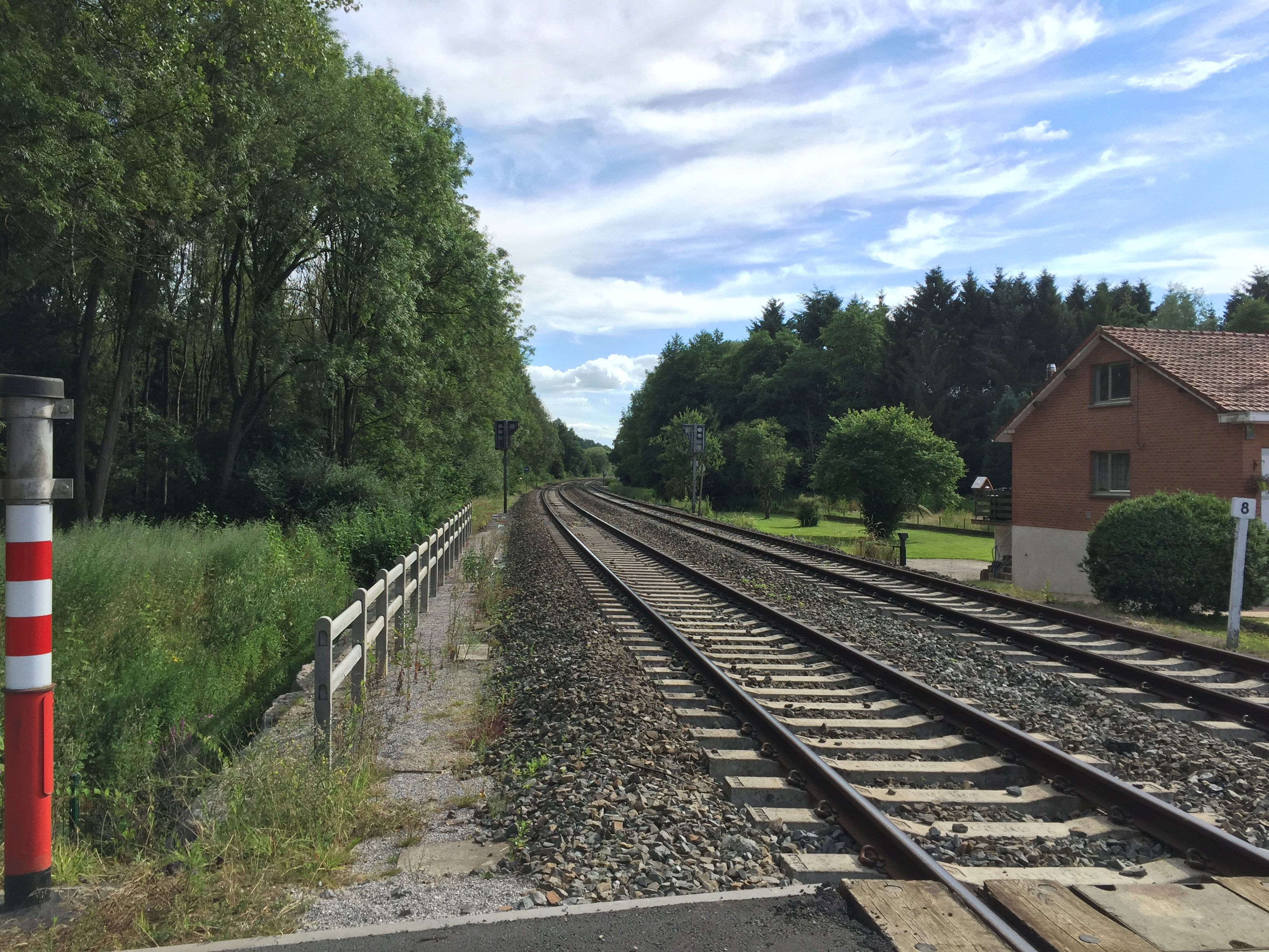 Ligne 132 d'infrabel à la rue du Tordoir à Cour-sur-Heure - Vue vers Berzée